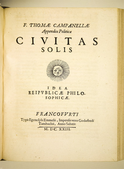 Civitas Solis, Francofurti, impensis Godefridi Tampachii, 1623